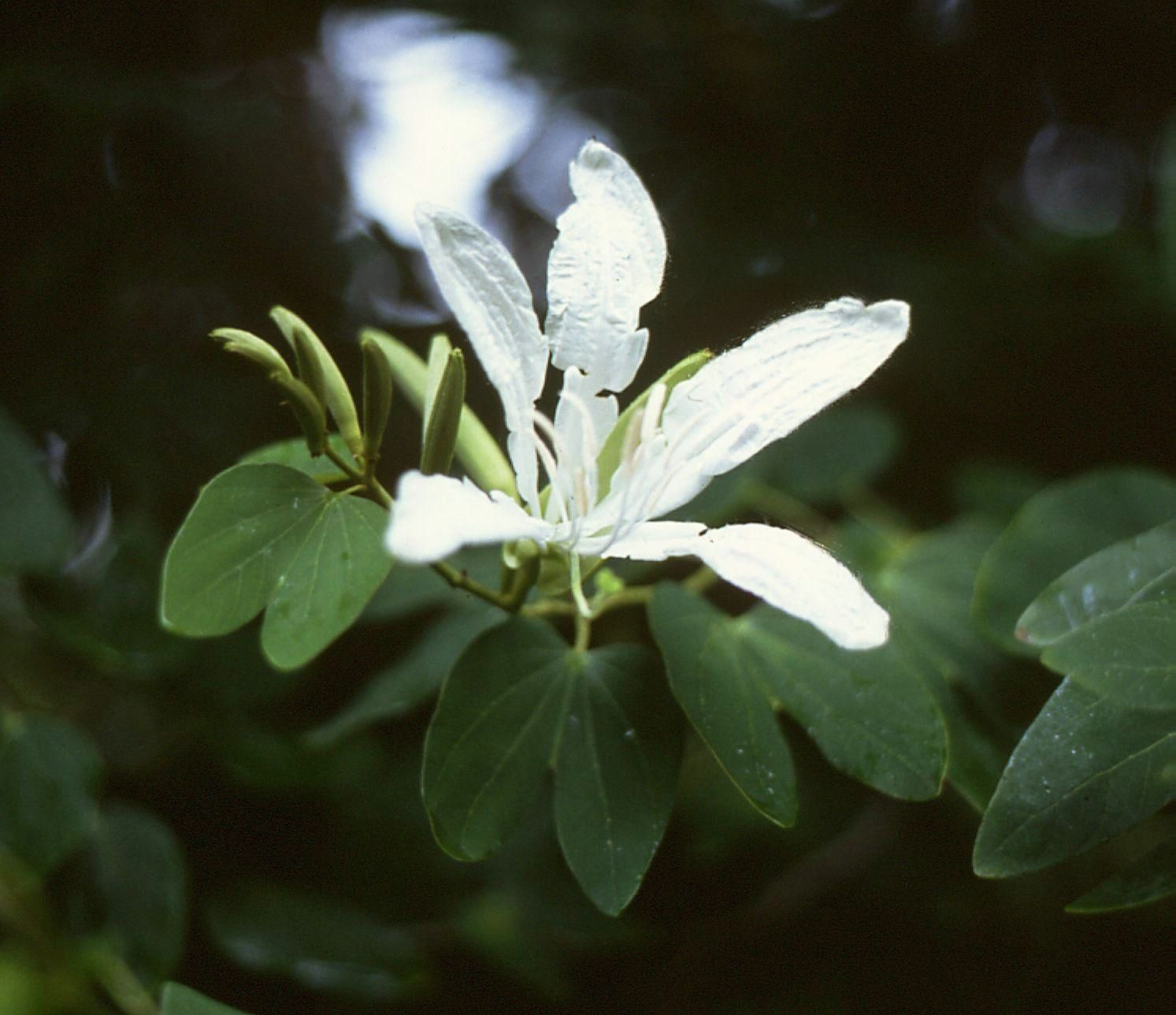 Bauhinia forficata subsp. pruinosa (Syn.: Bauhinia candicans), Hülsenfrüchtler (Fabaceae), Johannisbrotgewächse (Caesalpinioideae) - Argentinien/Argentina, Buenos Aires, Jardín Botánico Carlos Thays